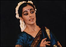 אוסנת רוקדת